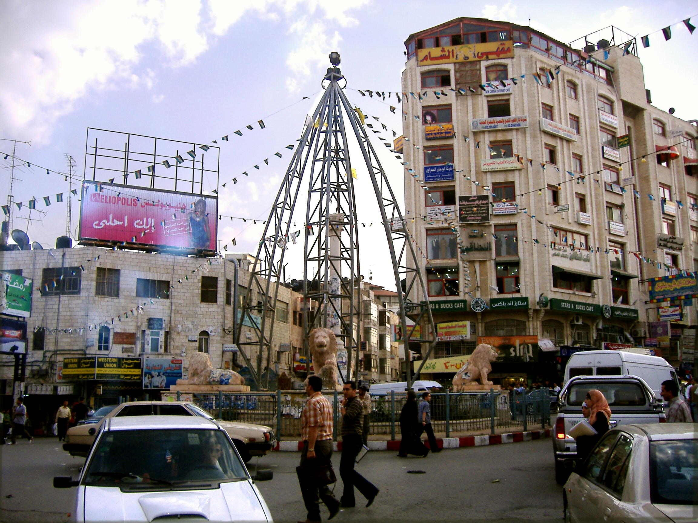 Centrum města Ramalláh, náměstí Al-Manara